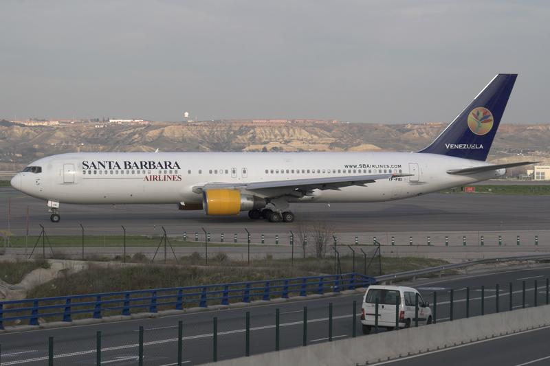 Santa Barbara Airlines (Icelandair) Boeing 767-300 TF-FIB